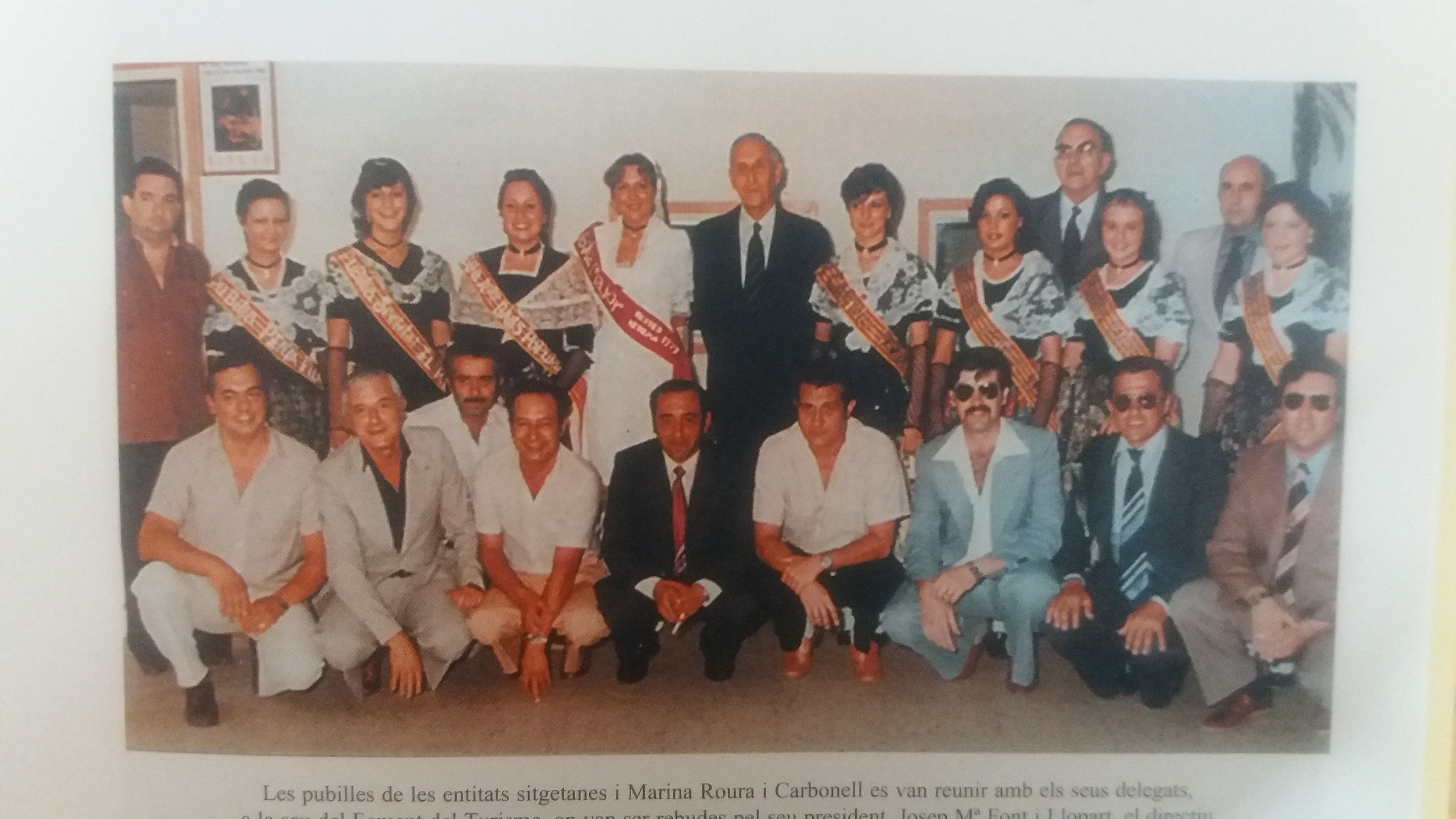 Les primeres Pubilles sitgetanes reunides amb els seus delegats a la seu del Foment de Turisme l'any 1979.